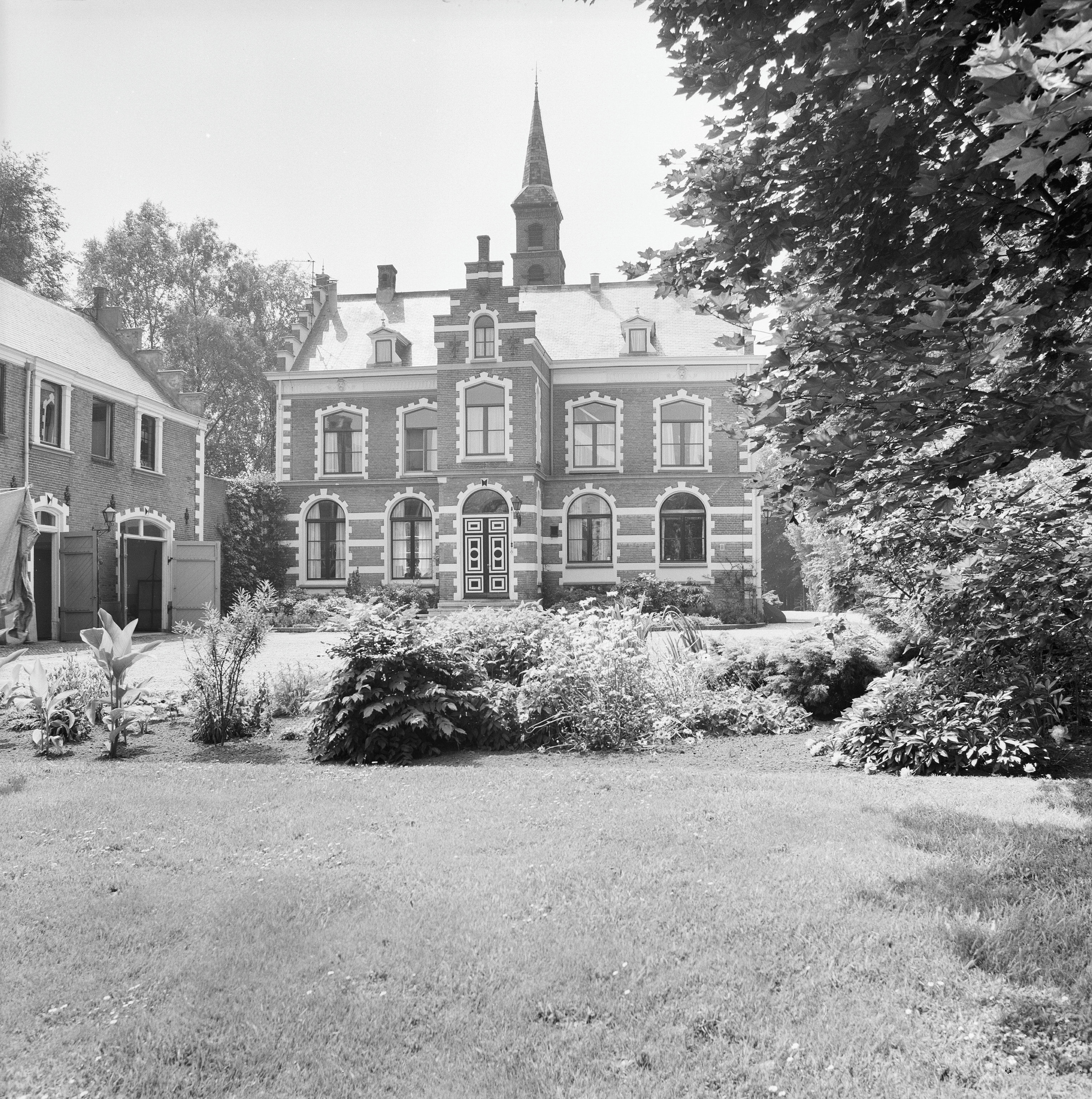 HUIS DE BRUINHORST: De Bruynhorst", voorgevel